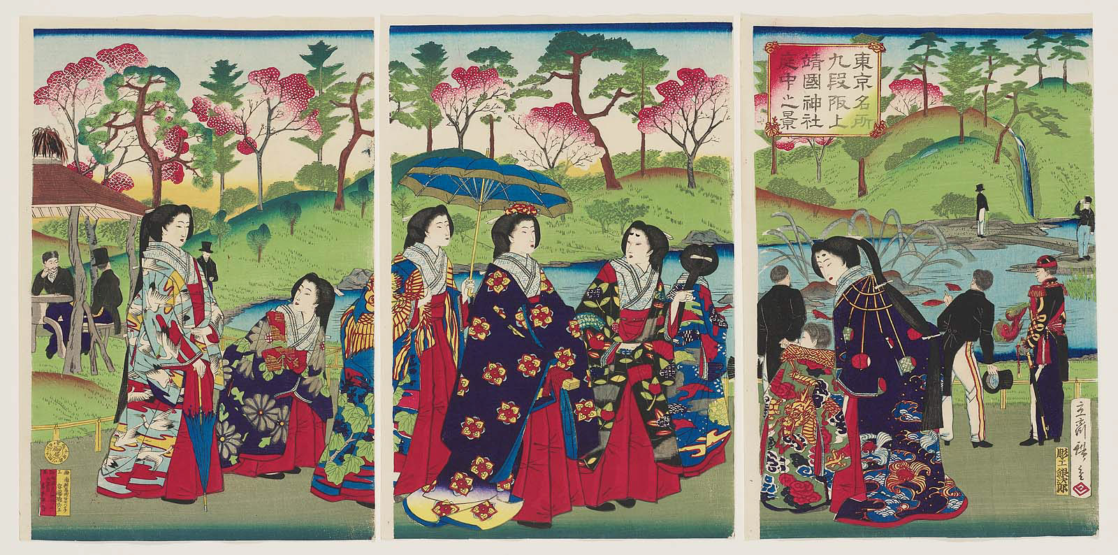 3代広重「東京名所九段坂上靖国神社庭中の景」